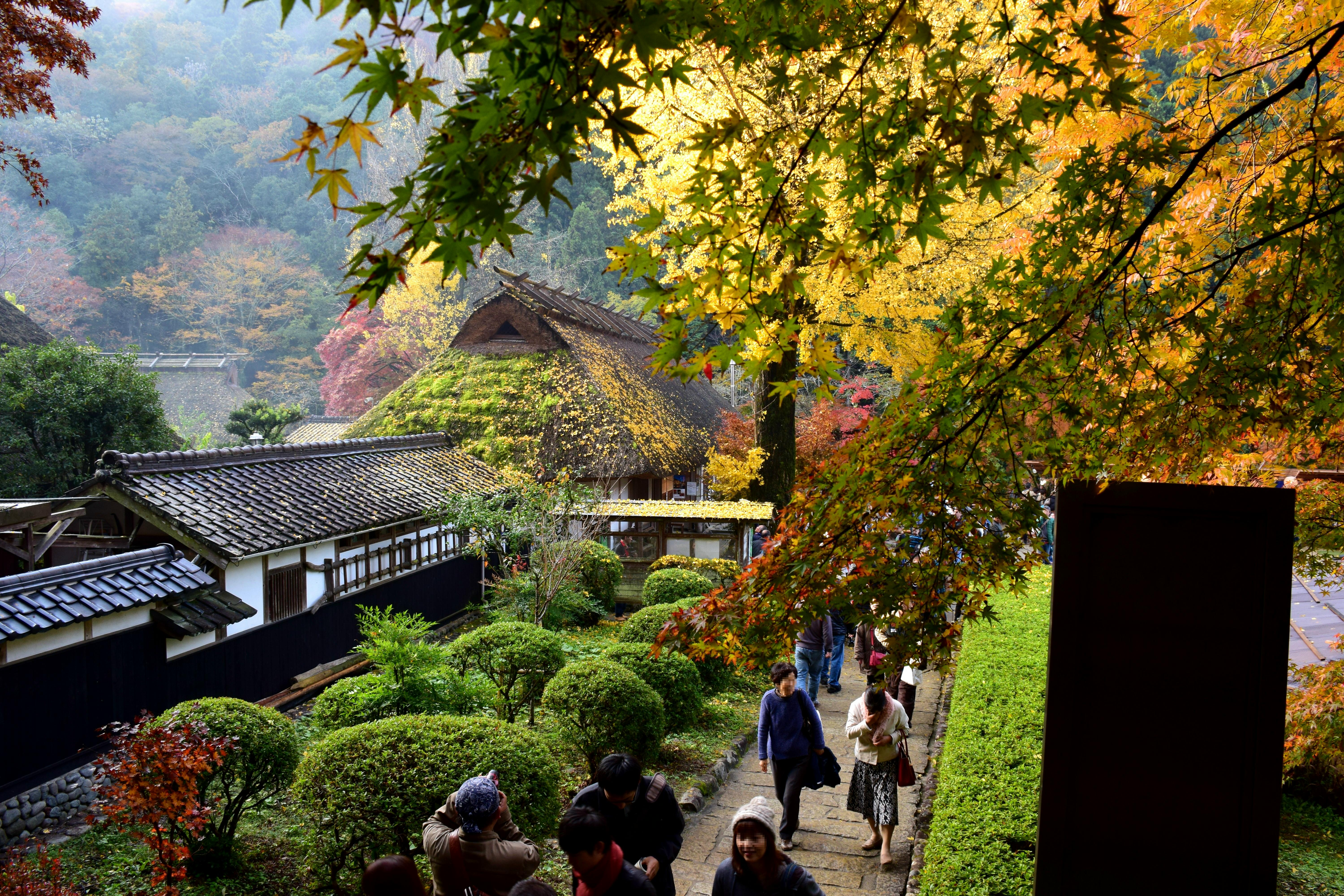 三州足助屋敷